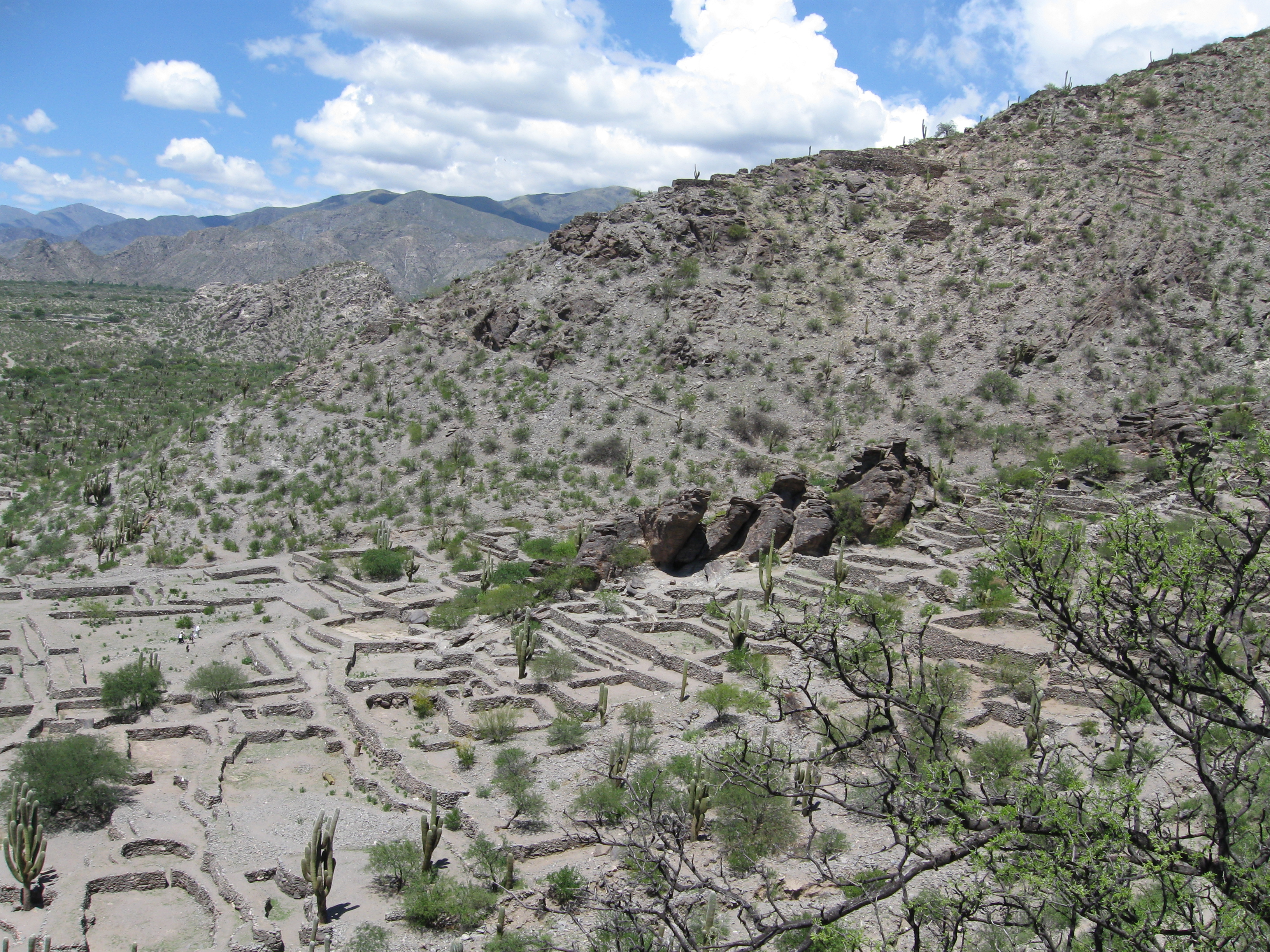 Foto de las Ruinas de Quilmes